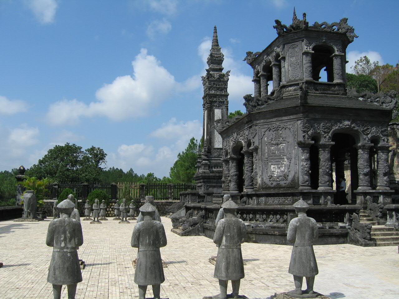 Khai Dinh's Tomb, Hue